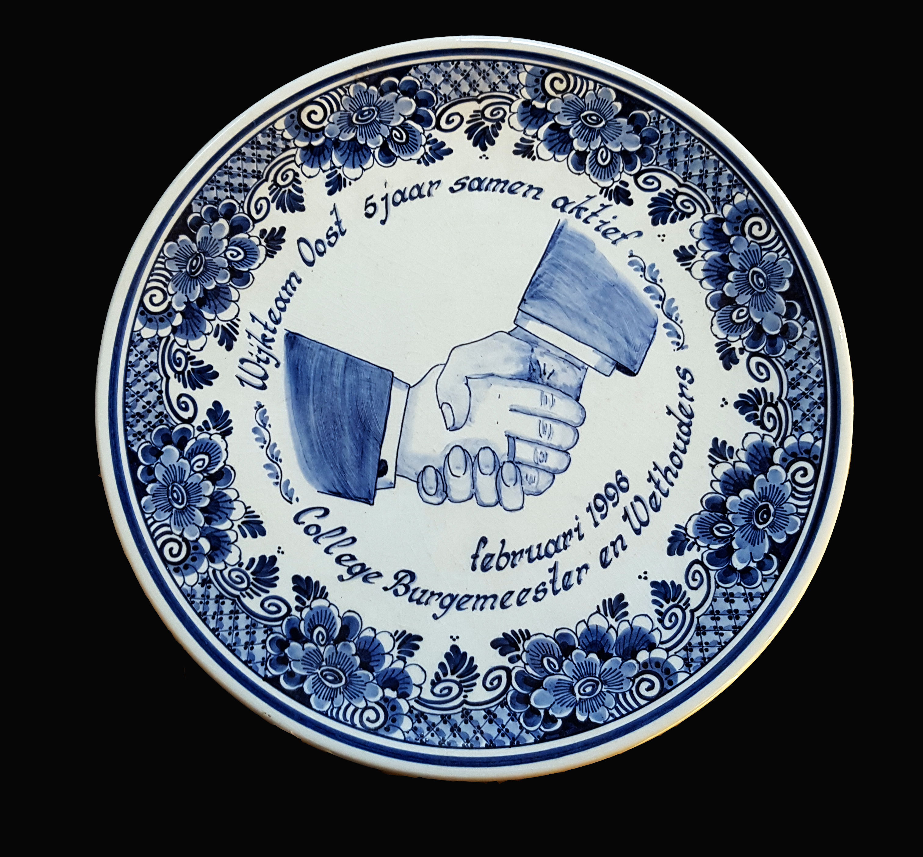 Blauw-wit herdenkingsbord Wijkteam Oost Gouda. Tekst: Wijkteam Oost, 5 jaar samen actief, februari 1996, College Burgemeester en Wethouders. Afbeelding: Bloemenrand en in het midden twee handen die elkaar de hand geven.